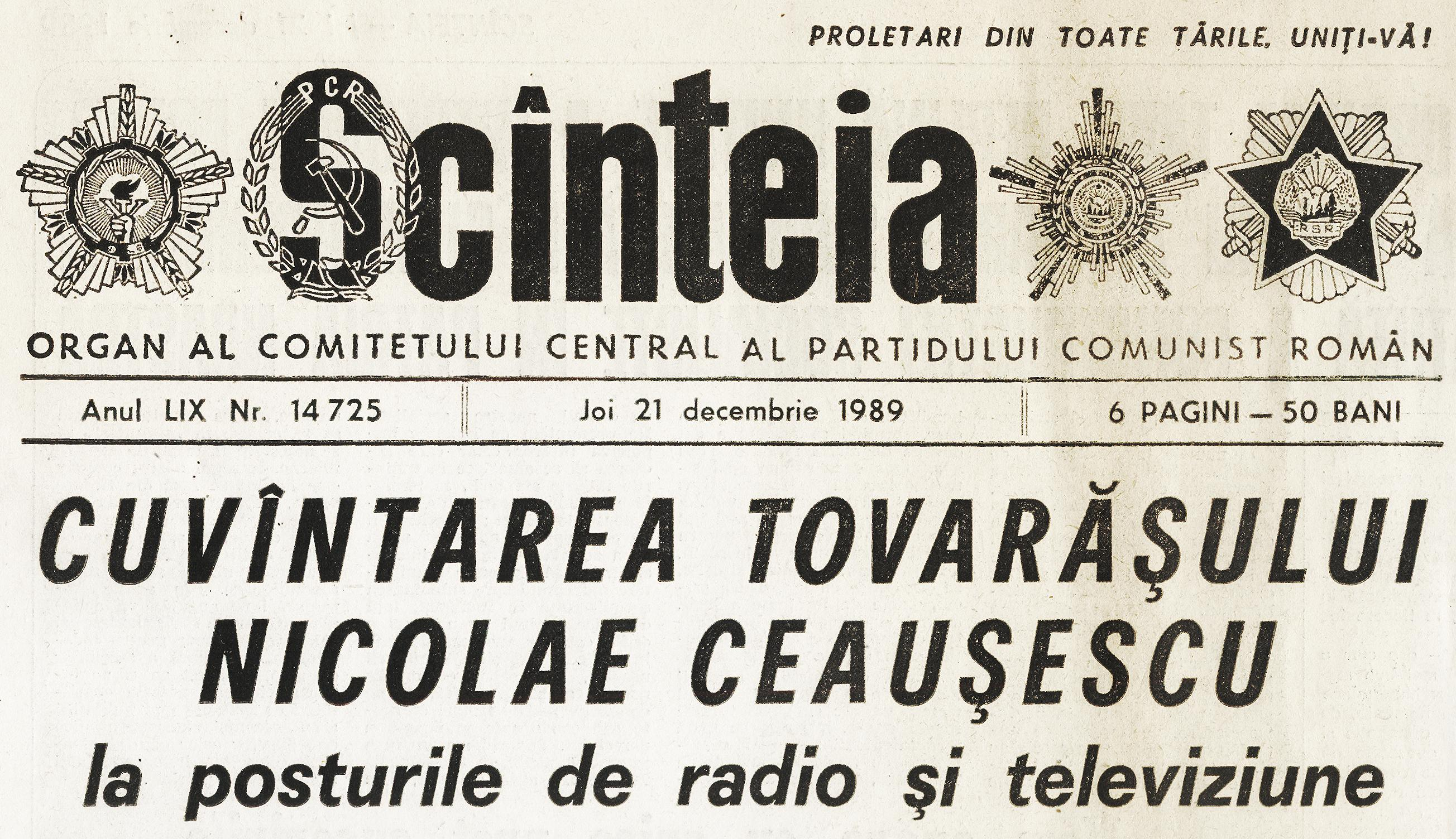 Scînteia 21 decembrie 1989 Scînteia - organ al Comitetului Central al Partidului Comunist Român Anul LIX Nr. 14 725 Joi 21 decembrie 1989 6 pagini - 50 bani Cuvîntarea Tovarăşului Nicolae Ceauşescu la posturile de radio şi televiziune